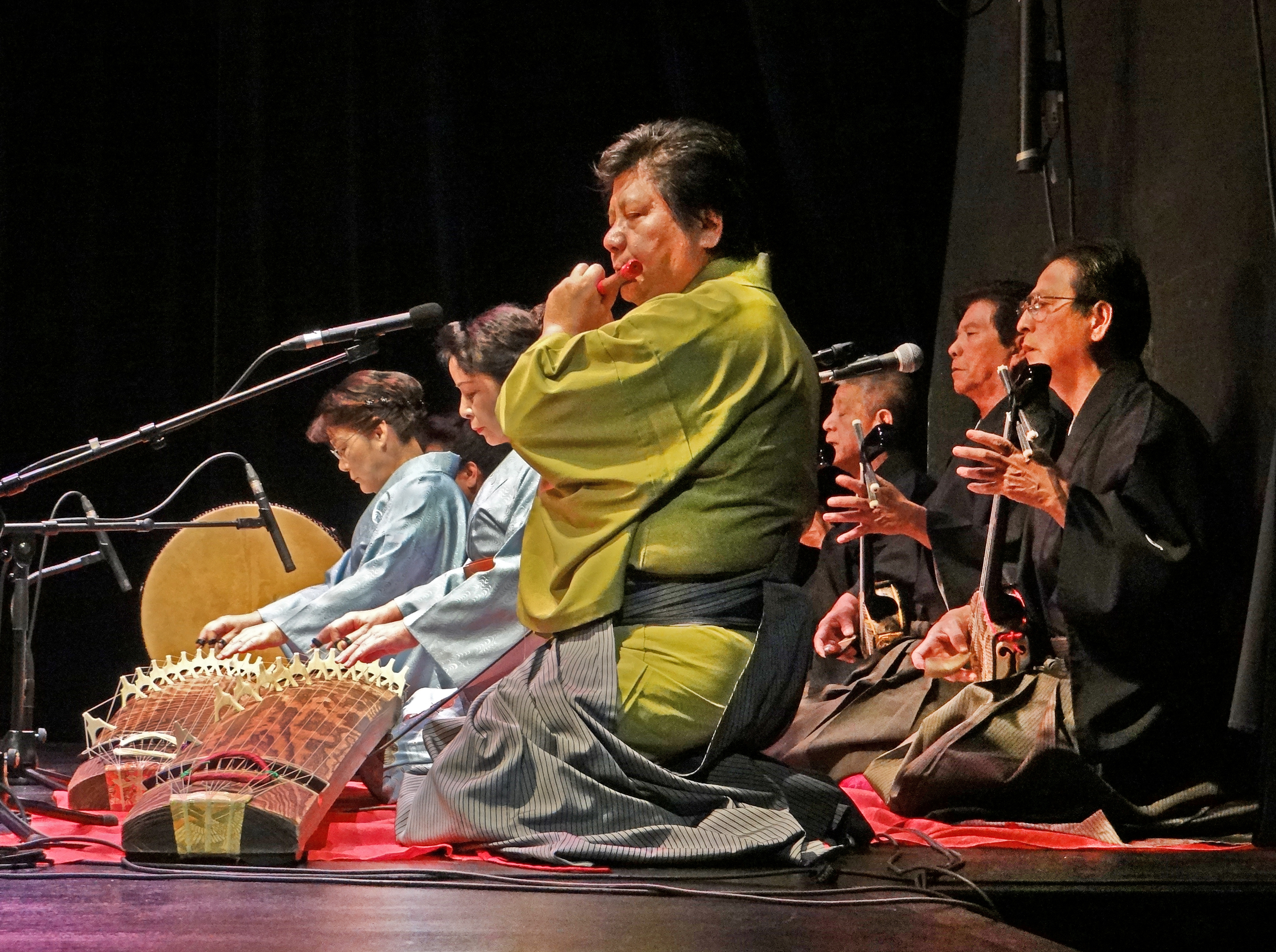 Orchestre traditionnel d'Okinawa accompagnant les danses de cour et les danses populaires L'orchestre est composé d'un joueur de flûte au premier plan, de deux joueuses de Koto à gauche, de trois joueurs de Sanshin à droite et d'une joueuse de tambour au fond (non visible sur la photo). Le sanshin est un luth à 3 cordes, c'est l'instrument traditionnel le plus caractéristique de la culture d'Okinawa, il est issu du Sanxian chinois. La troupe est composée de quinze danseurs et sept musiciens, sous la direction de Mme Yamada Tatsuko, fondatrice de l’école Muyûge, Trésor vivant de la Danse Traditionnelle d'Okinawa Un remarquable et étonnant spectacle présenté dans l'auditorium du musée Guimet (responsable de la programmation Hubert Laot) avec le soutien de l'Ambassade du Japon en France et de divers mécènes japonais Site de l'auditorium du musée national des arts asiatiques-Guimet Site pour le tourisme à Okinawa (français)